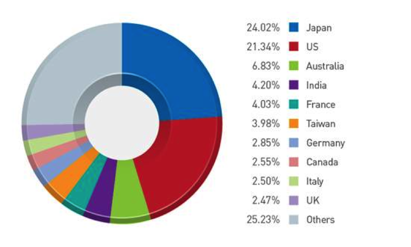 Монгол: Улс орнуудад биткойний эзлэх хувь